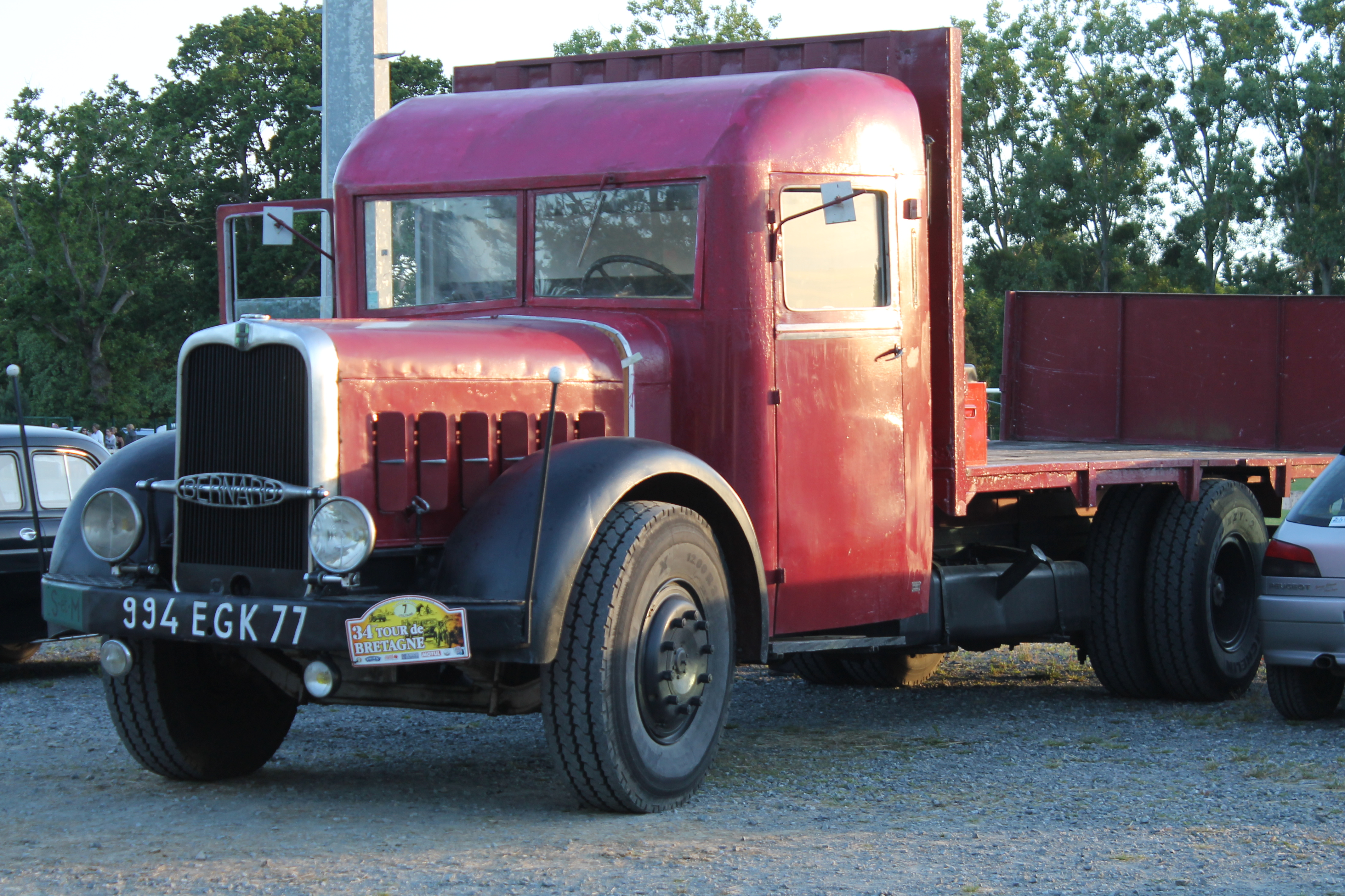 Bernard trucks plateau (avant)